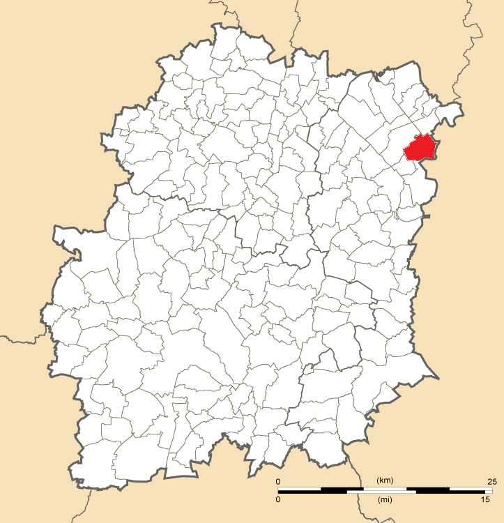 Carte de position de Tigery en Essonne (91)